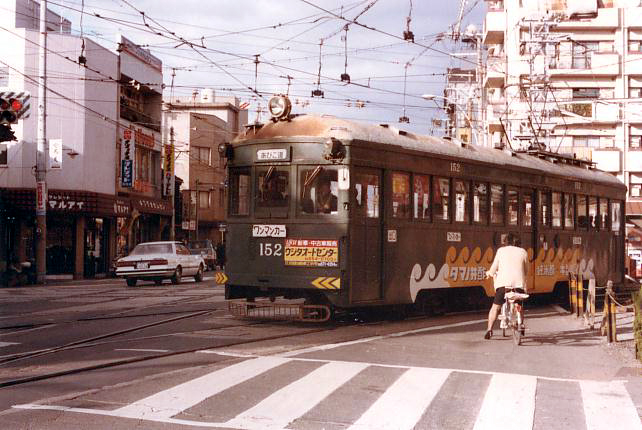 モ１５１形は雲塗装にはならず終生波塗装であった（モ１５１を除く） この１５２号は廃車後に大手家電量販店に引き取られたが 惜しくも解体の憂き目にあった。